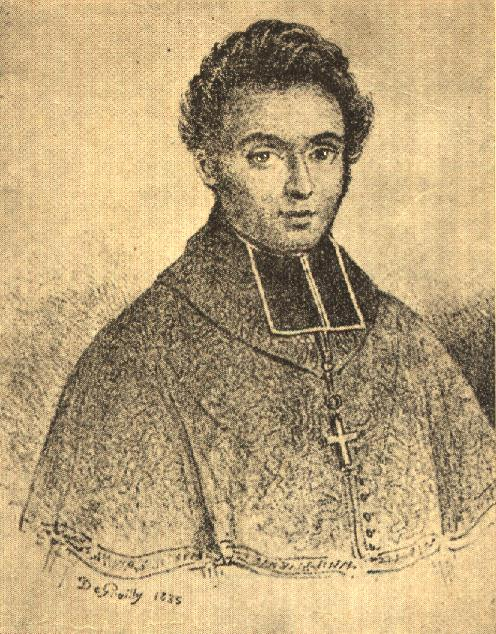 Ferdinand-François Chatel (1795-1857), réformateur religieux